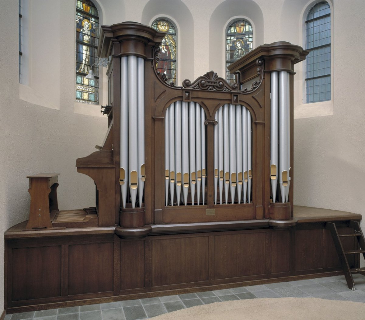 Sint Willibrorduskerk: Interieur, aanzicht orgel (opmerking: Gefotografeerd voor Het Historische Orgel in Nederland 1850-1858)